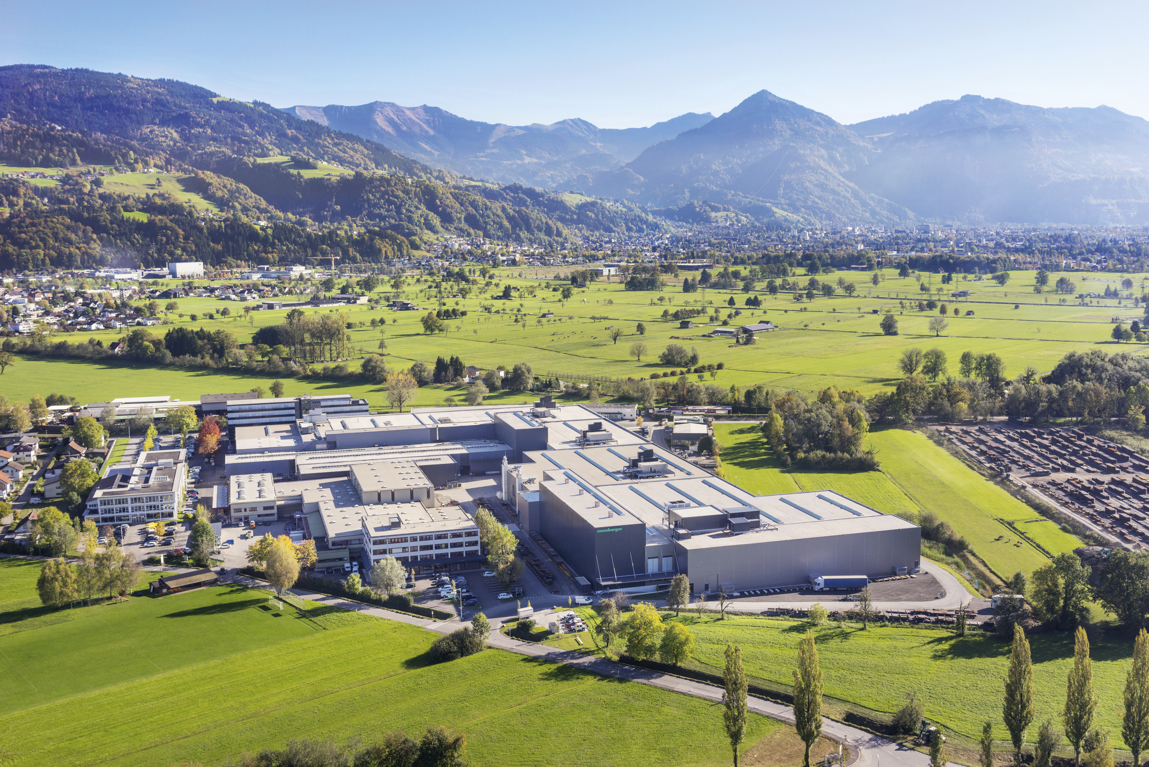 Aktuelle Luftaufnahme des Meusburger Headquarters in Wolfurt.